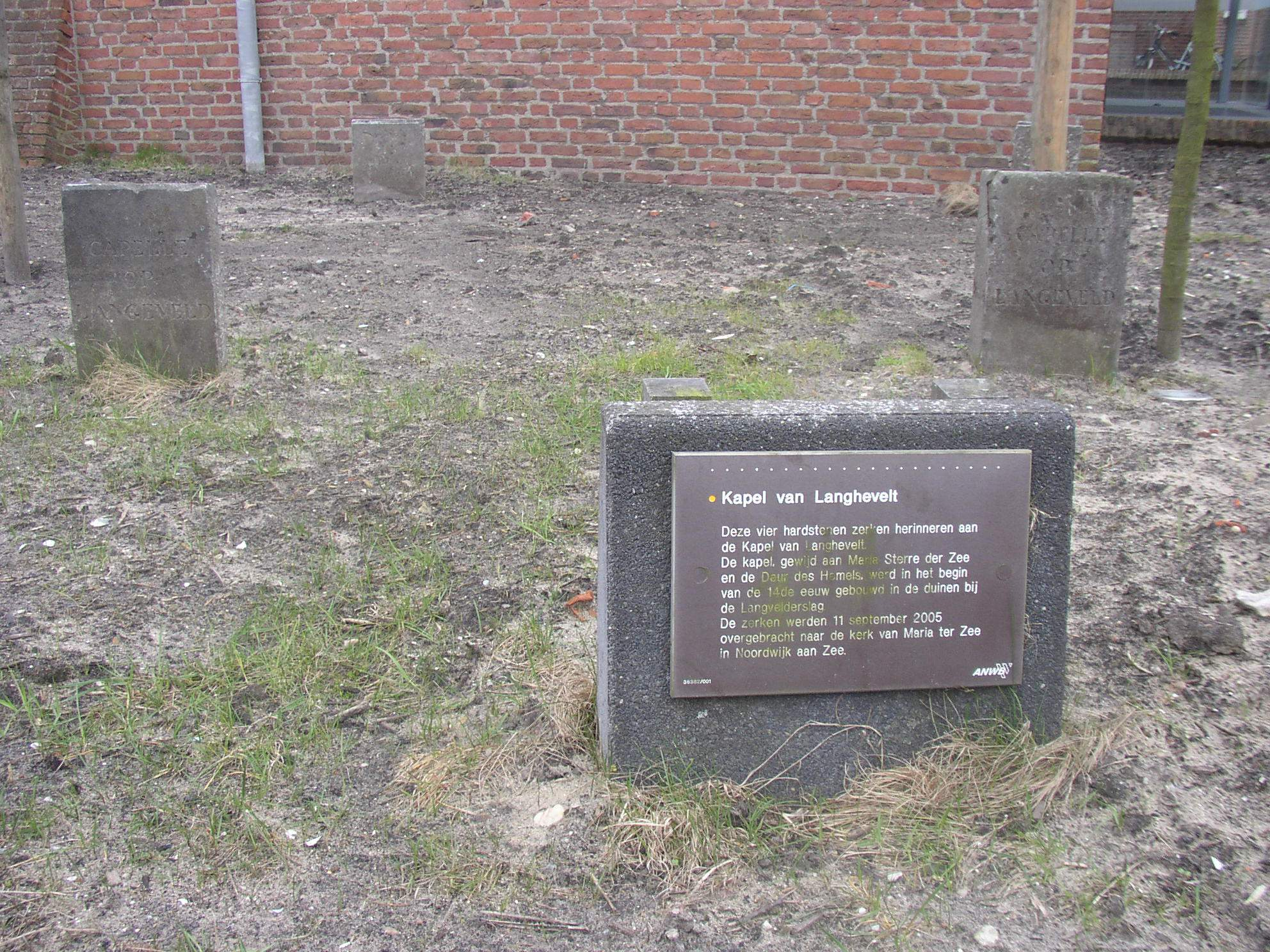 Kapel van Langhevelt. Vier hardstenen zuilen gemaakt na het verval van de kapel "Maria Sterre der Zee en Deur des Hemels", begin 14e eeuw, Langevelderslag, Noordwijk. De zuilen, uit ca 1840-1880 zijn in 2005 overgebracht naar kerk Maria ter Zee, Noordwijk aan Zee.